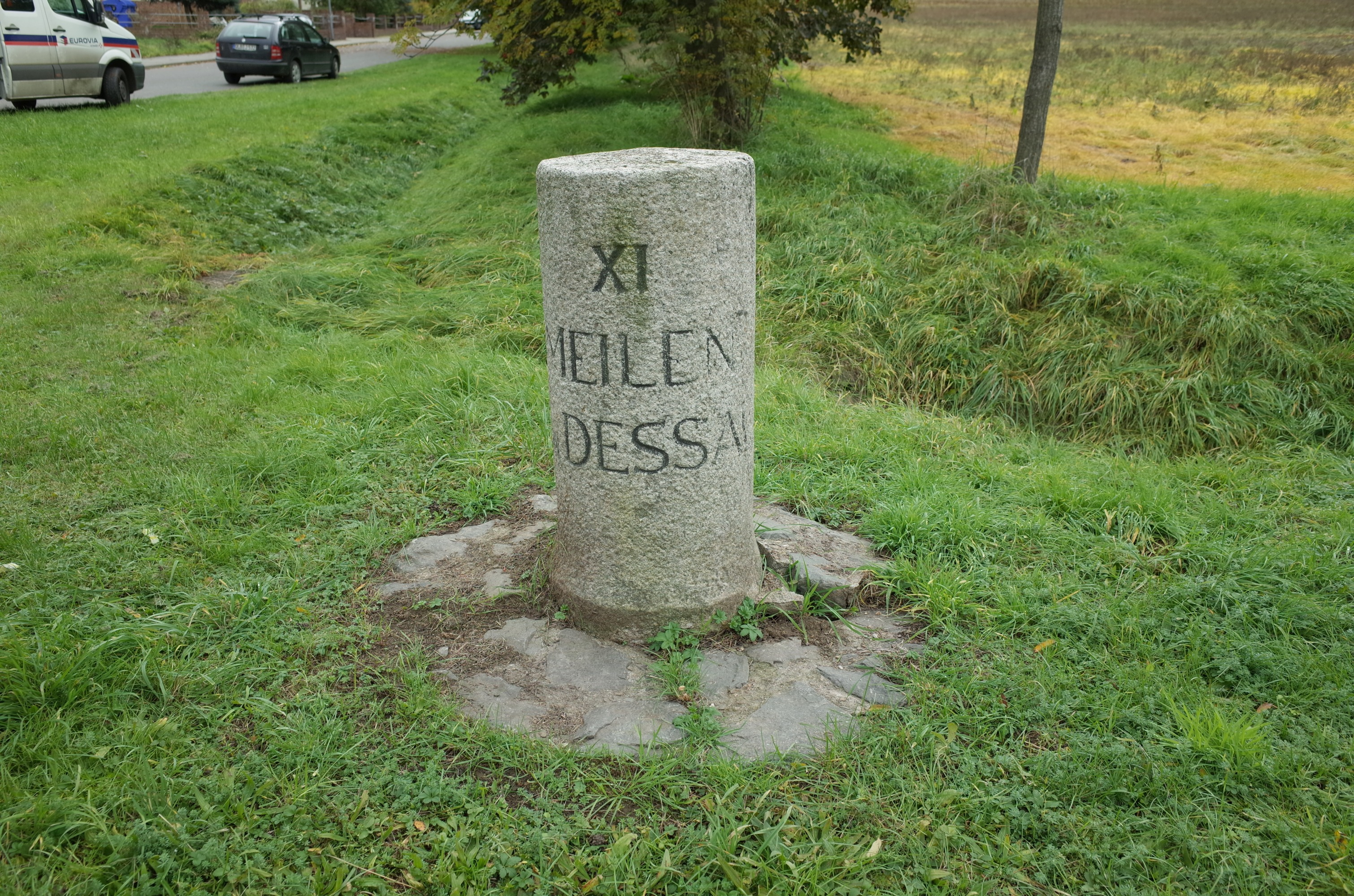 Ballenstedt, Anhaltischer Meilenstein Quedlinburger Straße am westlichen Ortsausgang von Ballenstedt nahe der Gabelung der Straßen Richtung Gernrode bzw. Rieder. Innschrift: XI MEILEN VON DESSAU (Baudenkmal im Denkmalverzeichniss Sachsen-Anhalt, Erfassungsnummer: 094 50354 000 000 000 000 [1])